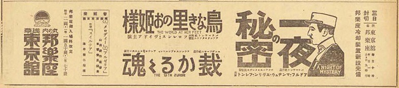 邦楽座・東京館、時事新報、1928年8月3日付新聞広告